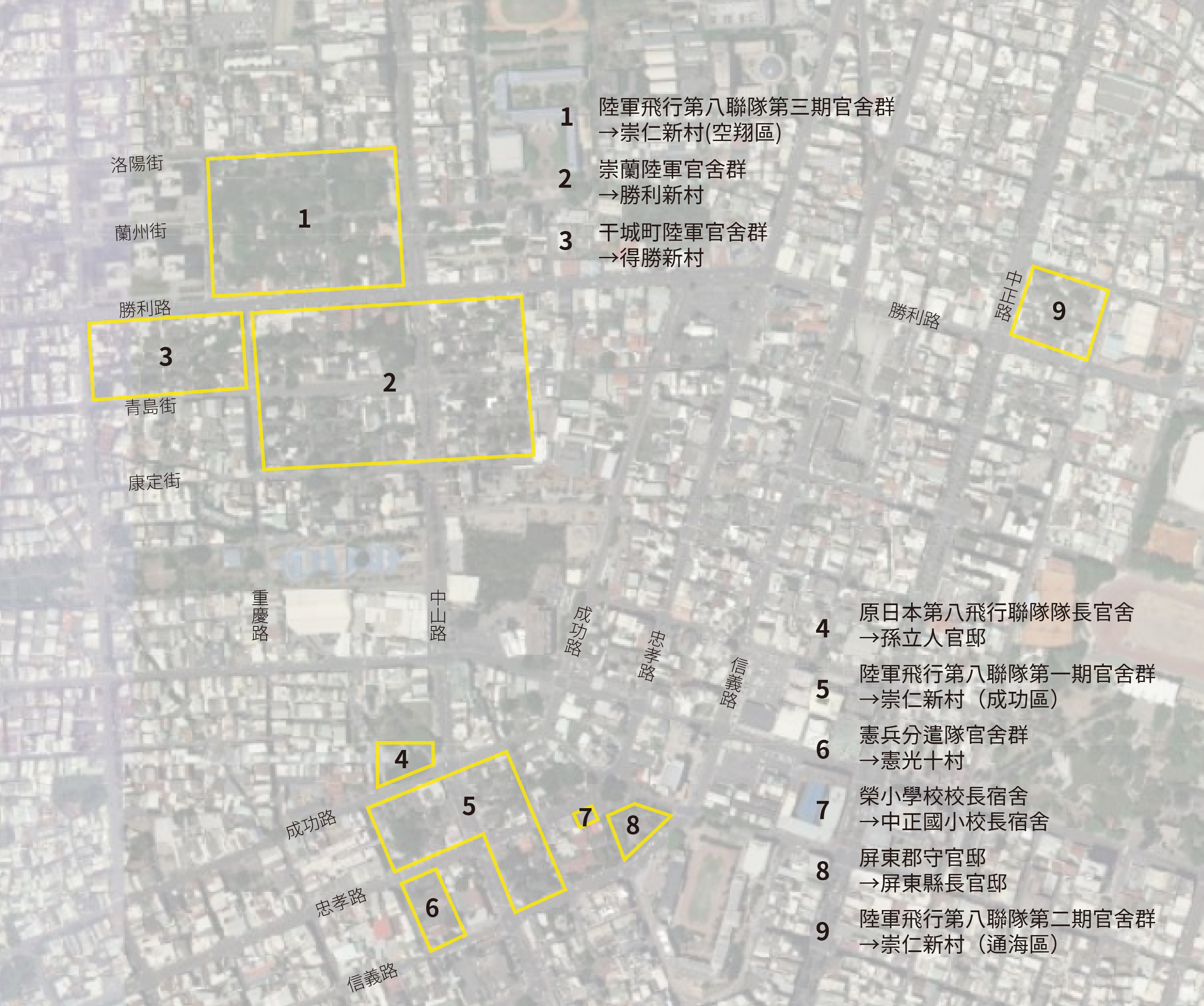 中文（台灣）: 包含陸軍飛行第八聯隊官舍(崇仁新村空翔區、成功區、通海區)、崇蘭陸軍官舍群(勝利新村)、干城町陸軍官舍群(得勝新村)、原日本第八飛行聯隊隊長官舍(孫立人將軍行館)、憲兵分遣隊官舍群(憲光十村)、榮小學校校長宿舍(中正國小小校長宿舍)、屏東郡守官邸(屏東縣長官邸)。 底圖來源：中央研究院人社中心GIS專題中心 (2018). [online] 臺灣百年歷史地圖. Available at: [2019-07-14].